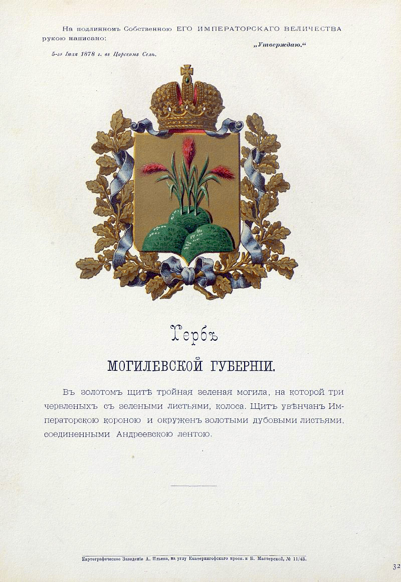 Official Russian Empire coat of arms Mogilev Governorate. Гласный герб Российской Империи Могилёвской губернии с официальным описанием в Гербовнике Бенке. Утверждён Императором Всероссийским Александром Вторым в 1878 году.